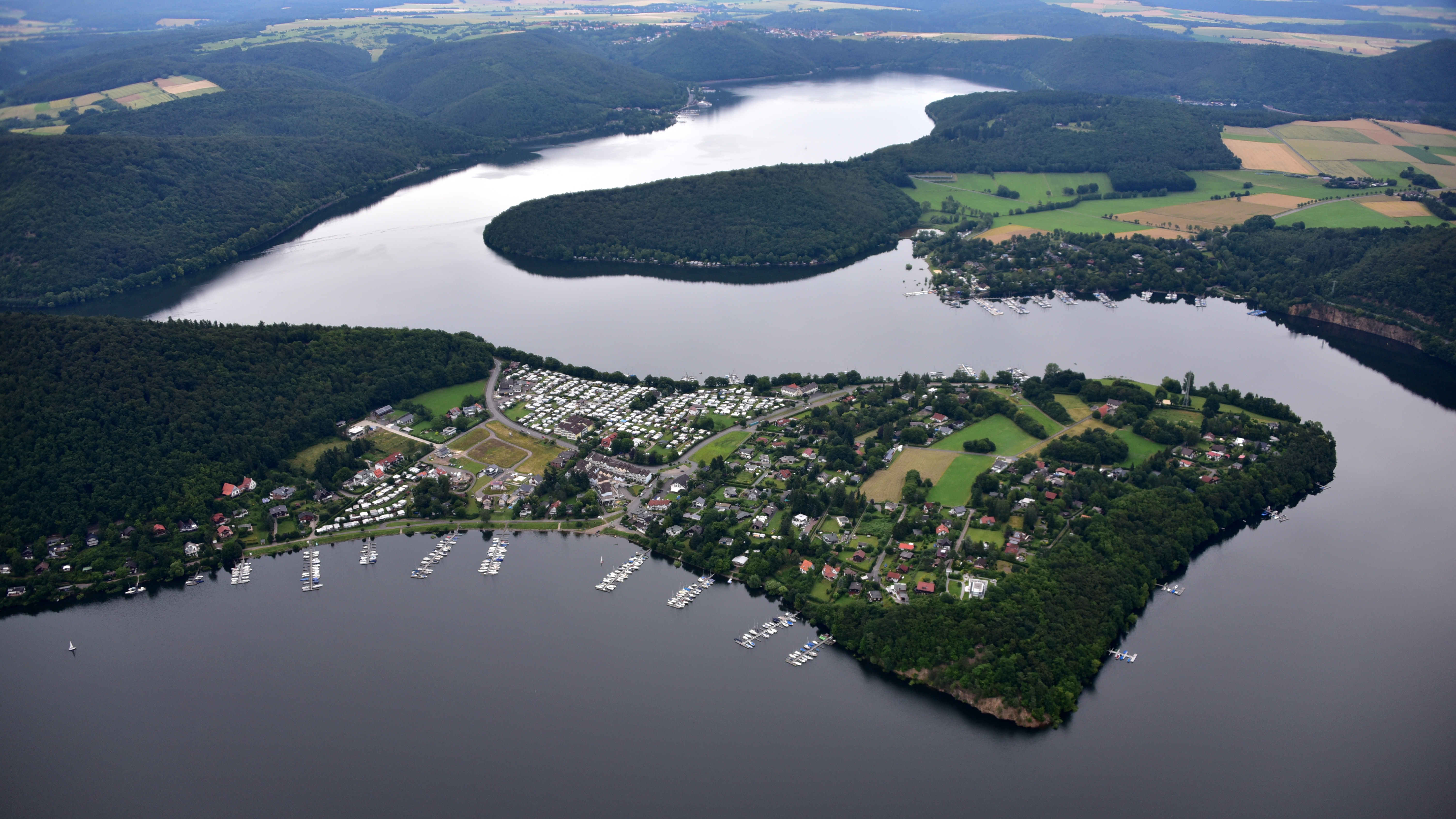 Edersee mit der Halbinsel Scheid; am oberen Bildrand das Schloss Waldeck; rechts die Ortslage Rehbach (Luftaufnahme 2016).